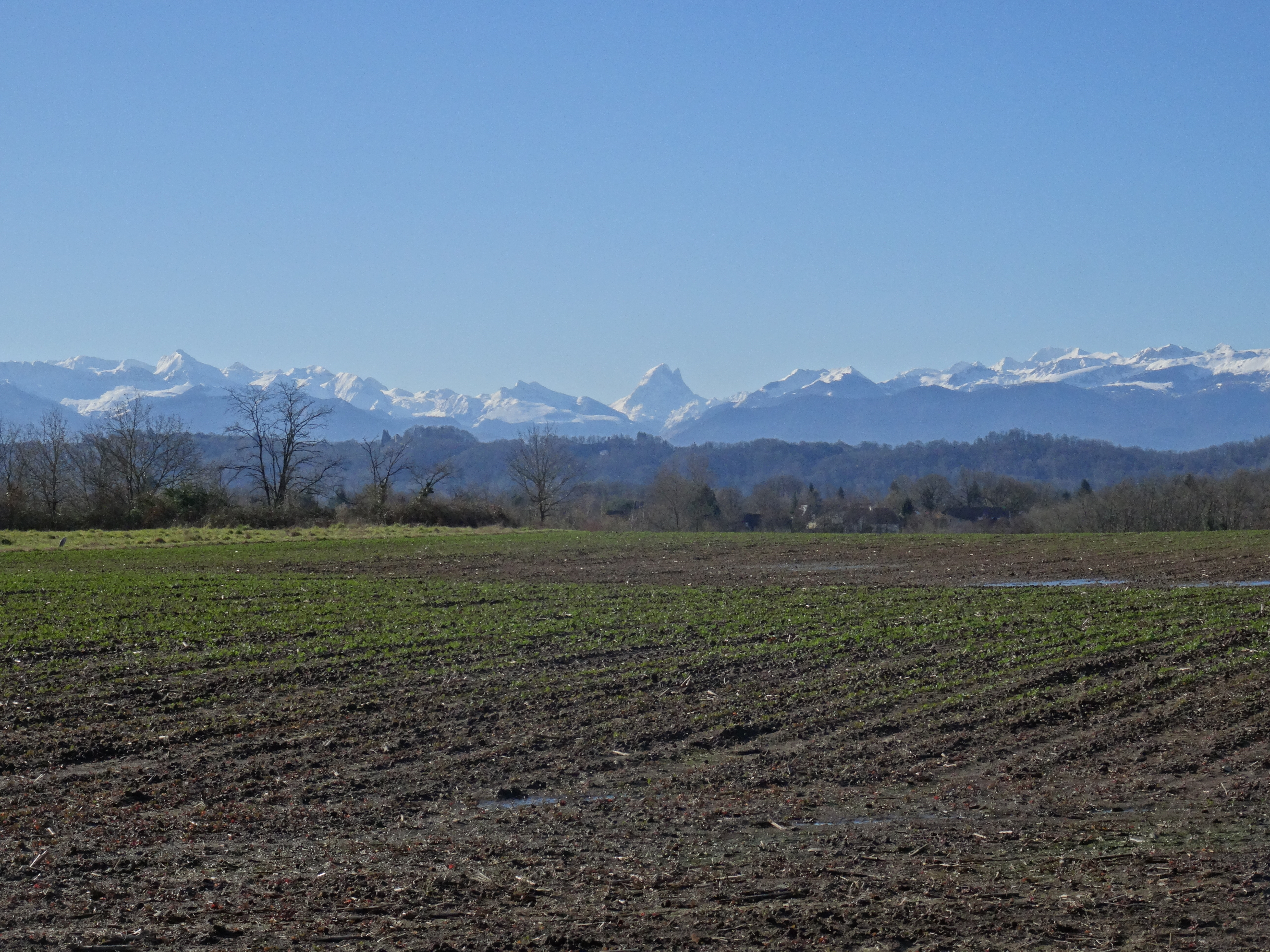 Vue depuis le Pont-Long à Lescar